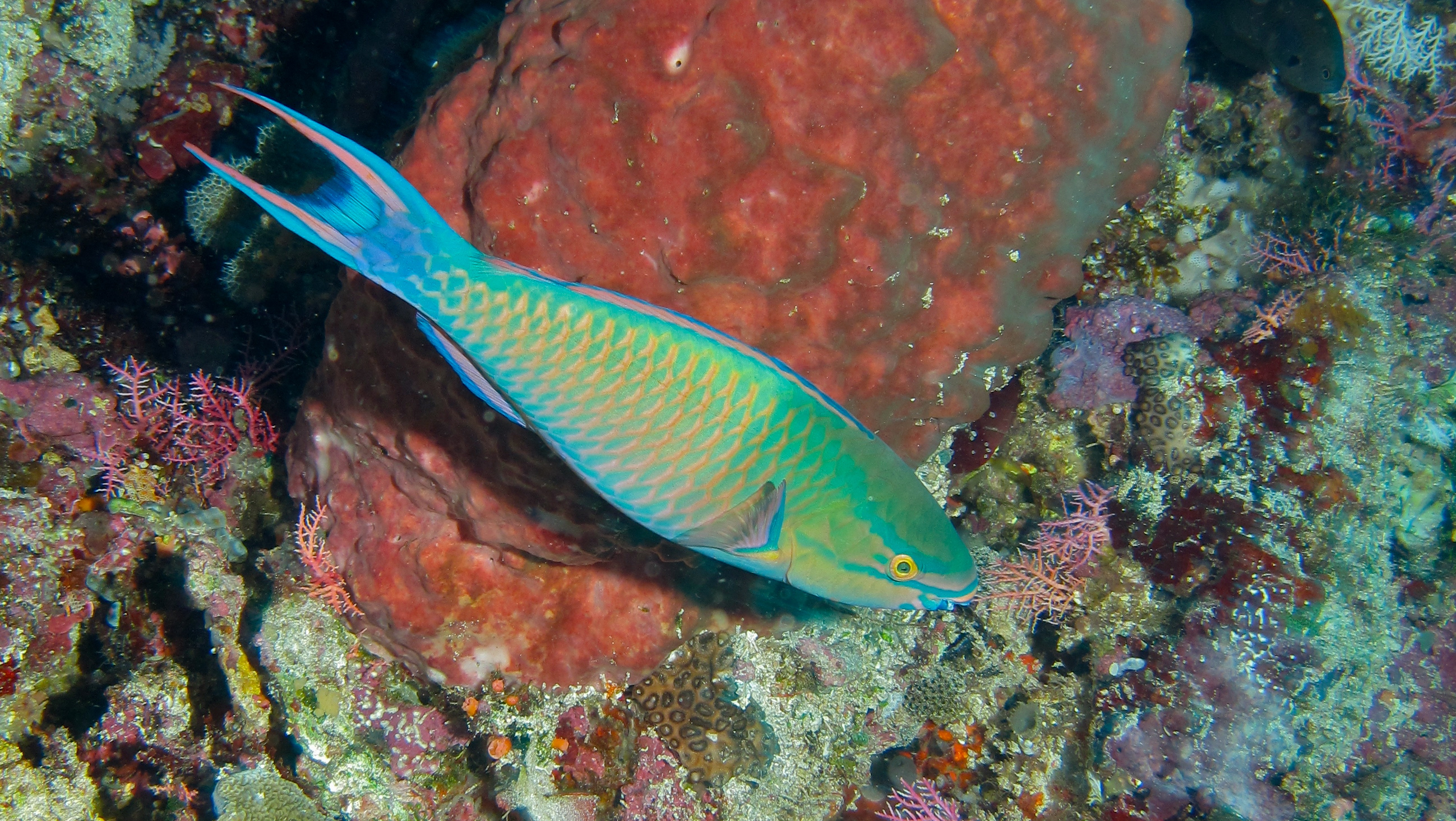 Timur I, Bunaken Island, Sulawesi, INDONESIA